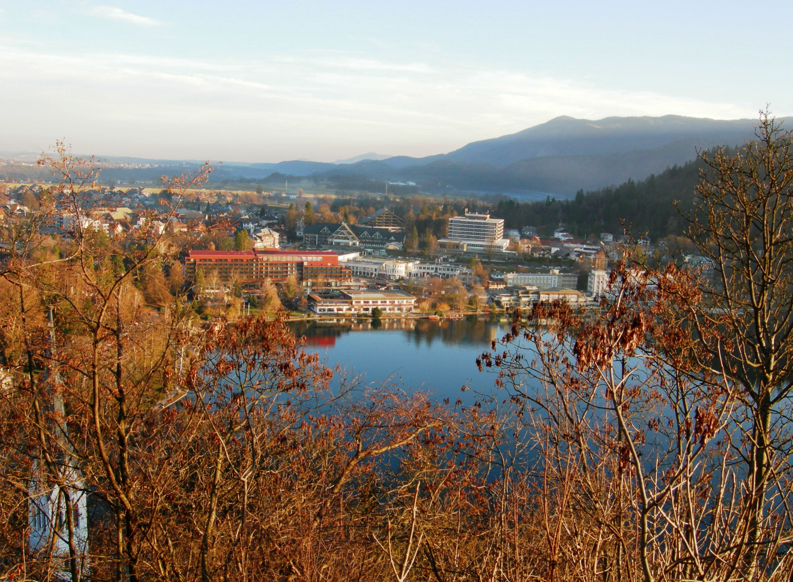 Bled